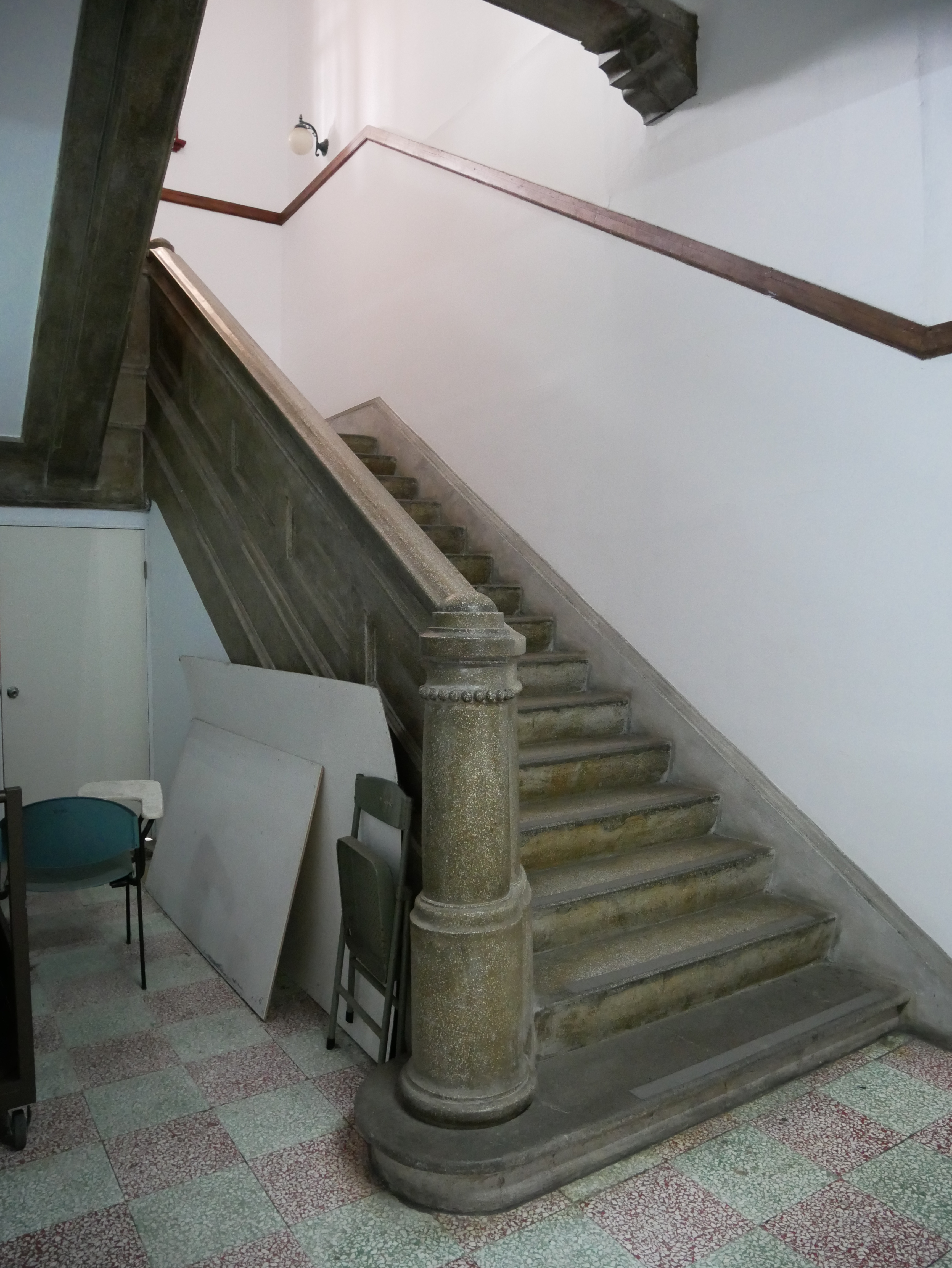 中文（台灣）: 新竹州廳內部樓梯，新竹市北區北門聯里大同里